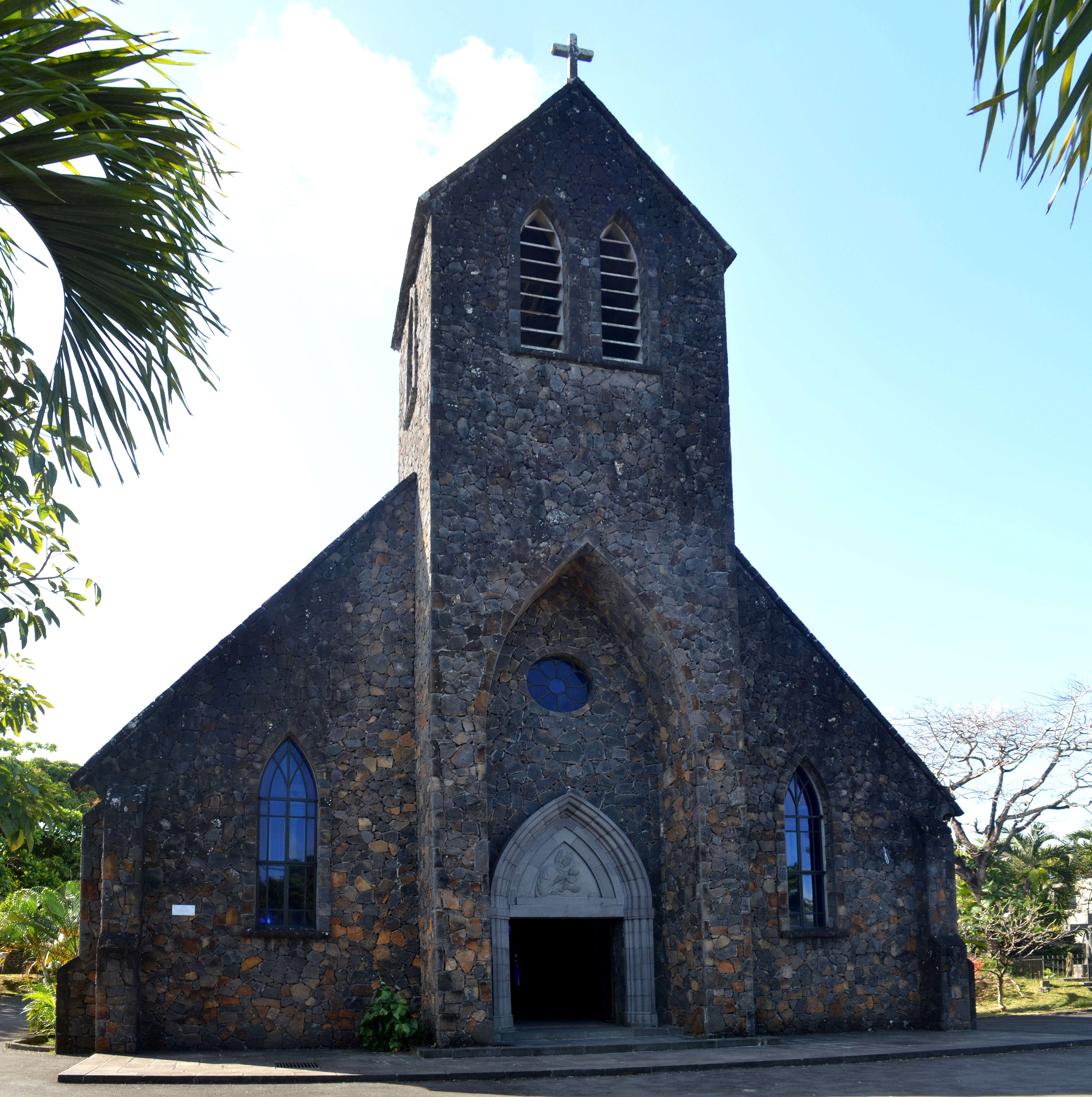 Trou d'Eau Douce, Norte-Dame de Bon Secours